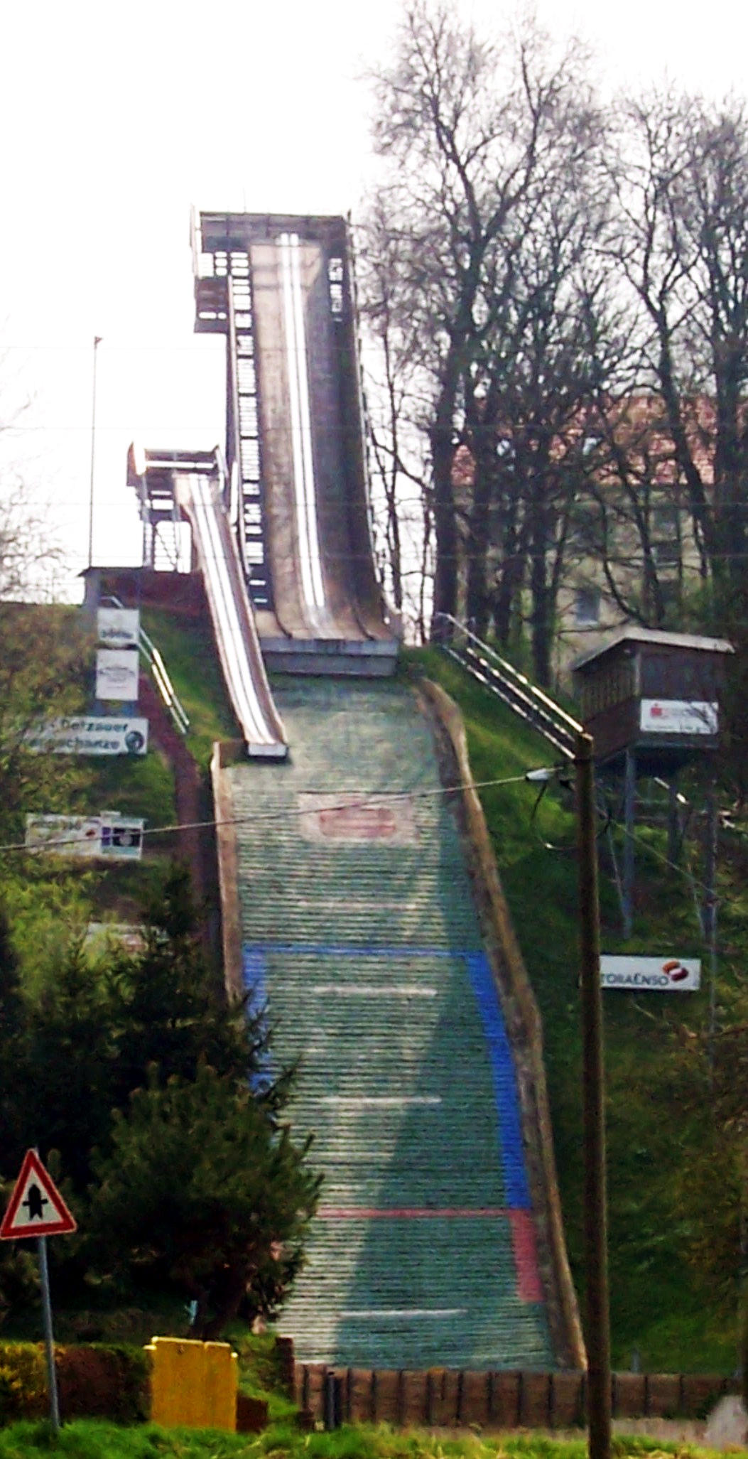 Flachlandsprungschanze in Eilenburg